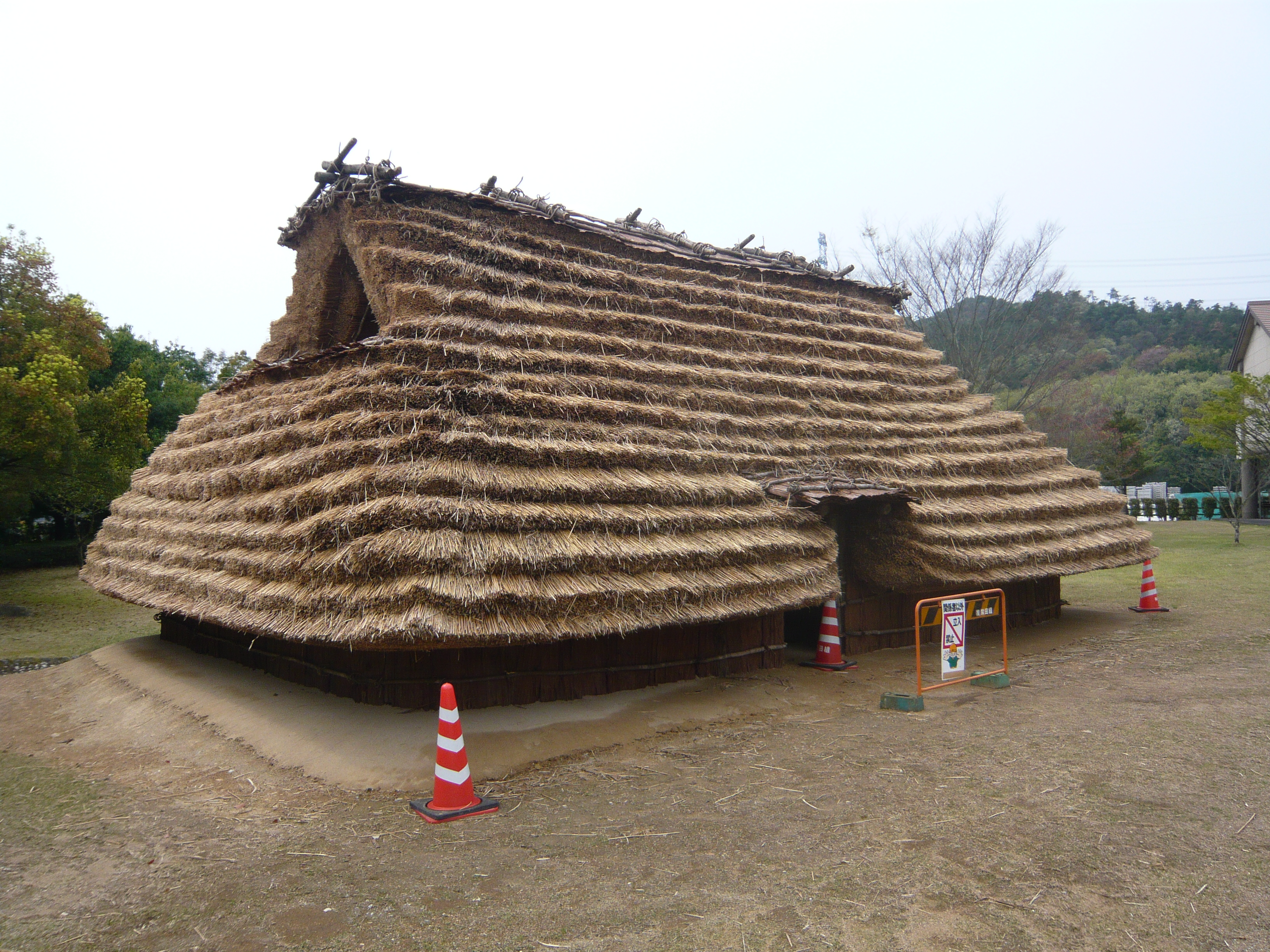 Tsukahara Ruins Park （塚原遺跡公園）,Seki,Gifu,Japan（岐阜県関市）で撮影。